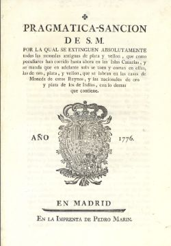 Pragmatica-Sancion de S.M. por la qual se extinguen absolutamente todas las monedas antiguas de plata y vellon, que como peculiares han corrido hasta ahora en las Islas Canarias, y se manda que en adelante solo se usen y corran en ellas, las de oro, plata, y vellon, que se labran en las casas de Moneda de estos Reynos, y las nacionales de oro y plata de los de Indias, con lo demas que contiene